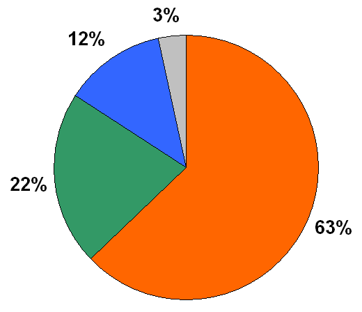 Anteile der Verkehrssysteme an gewerblichen Gütertransportleistung in Deutschland 2010